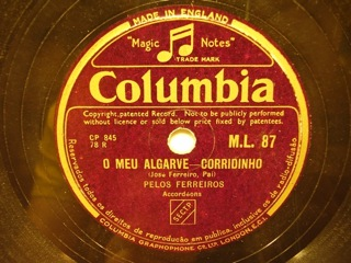 Gravação dos Ferreiros,do corridinho O Meu Algarve,da autoria de José Ferreiro (Pai)